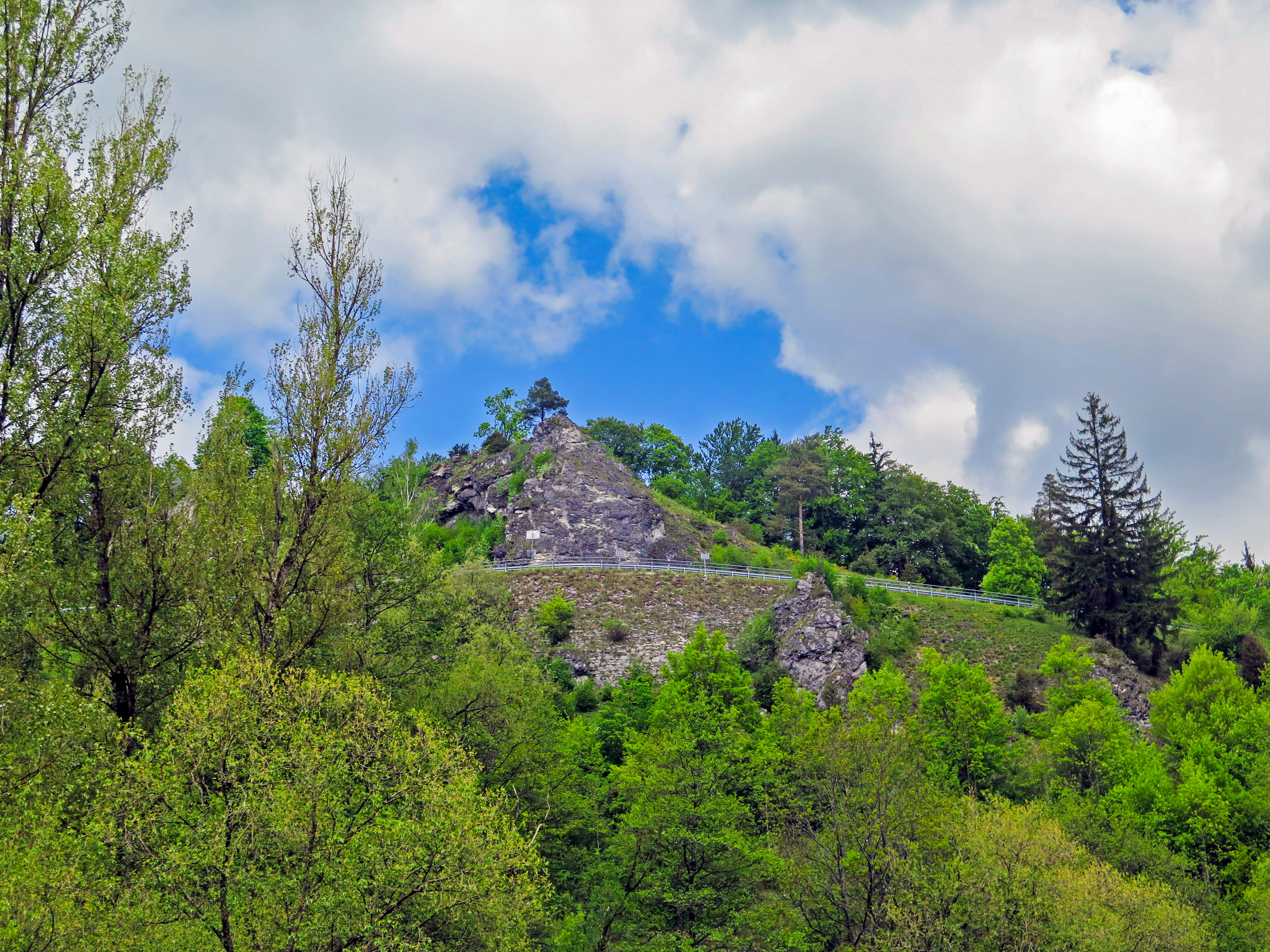 Geotop 478R009 - Felsburg Viktoriastein SE von Arnstein